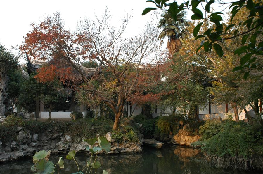 苏州怡园